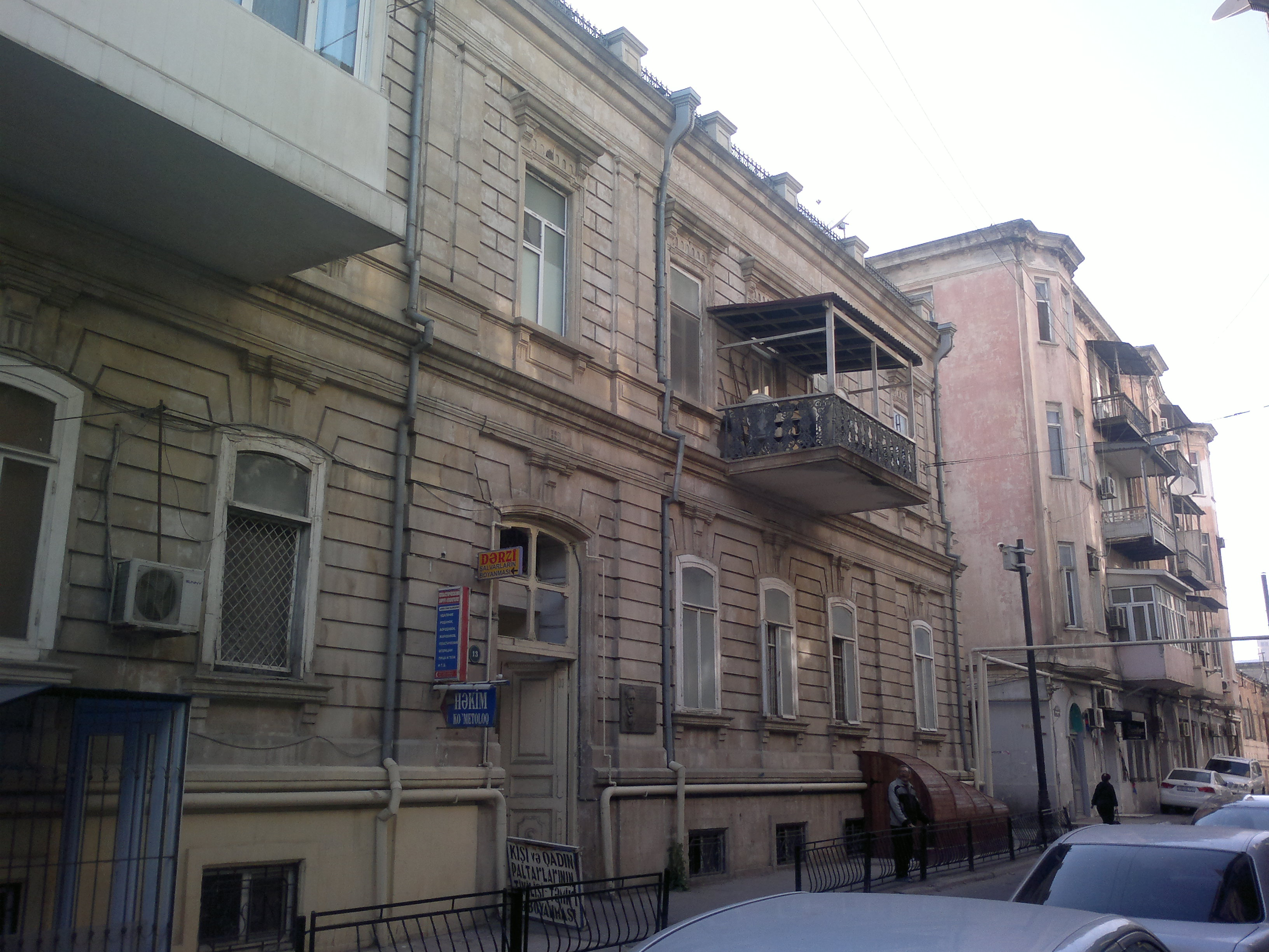 Building on 11 Mirza Ibrahimov Street. Built in 1889. Józef Gosławski (architect) lived here.